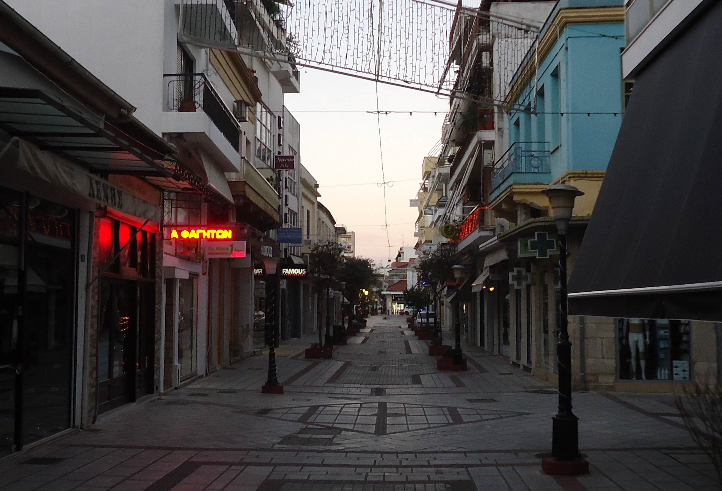 Οδός Σκουφά, Άρτα